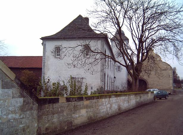 Limburgs: Kesjtièl Obbendorf of Bockhaof in Hazel (Haasdal)